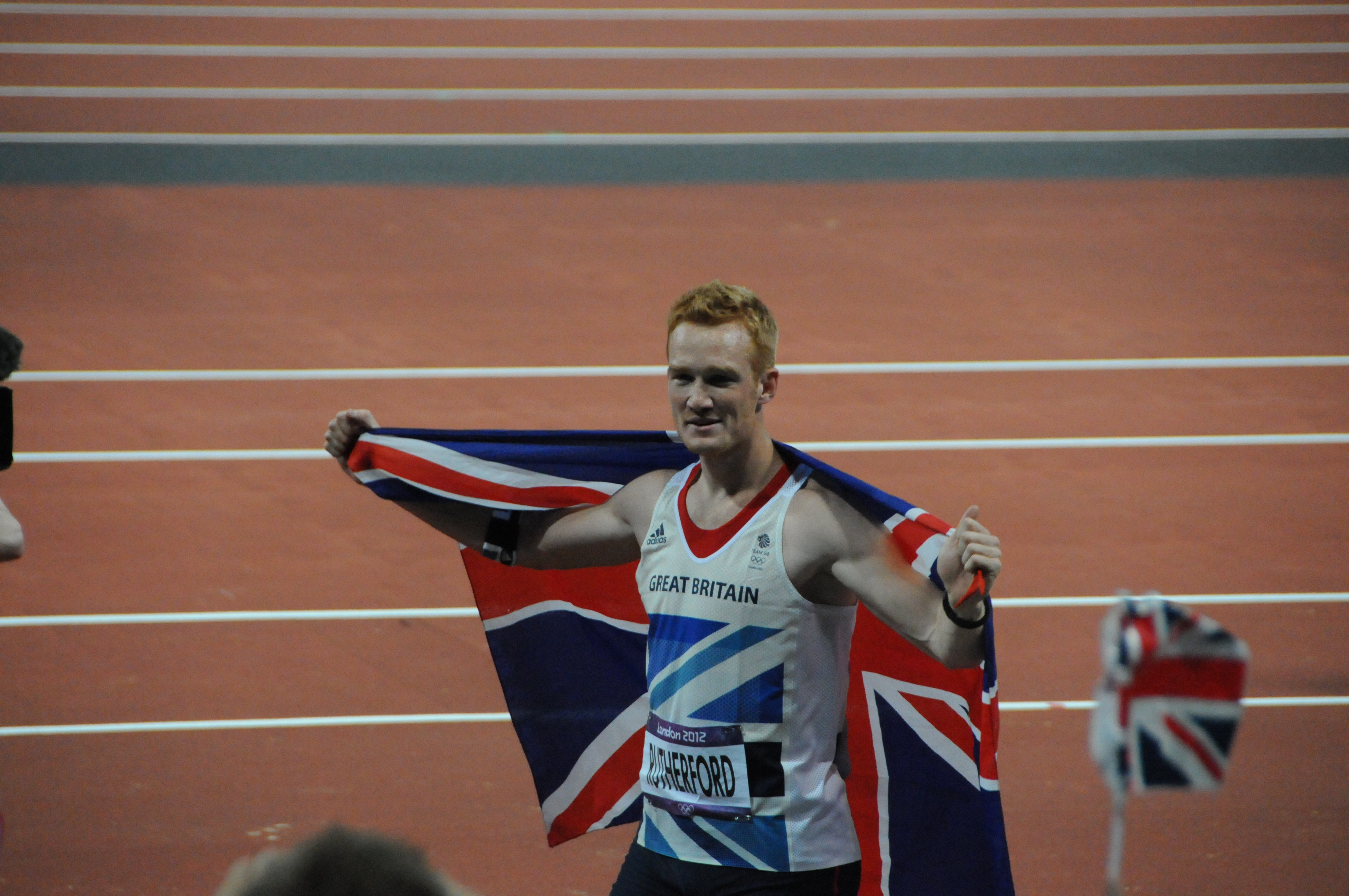 Greg Rutherford, le britanique médaillé d'or en saut en longueur à Londres 2012